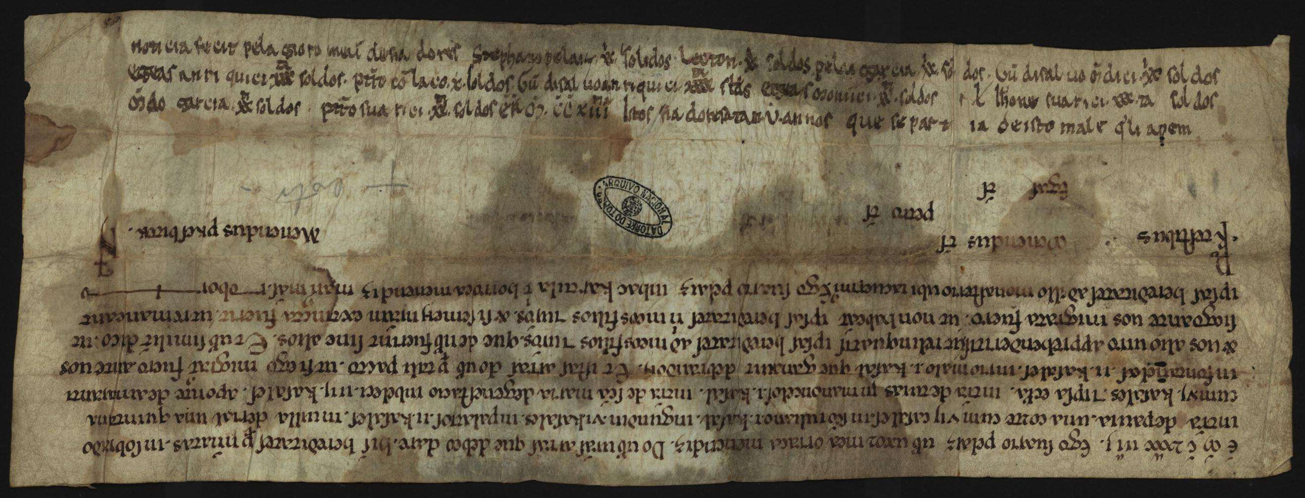 Noticia de fiadores, posible documento máis antigo escrito na lingua galaico-portuguesa. Anverso.